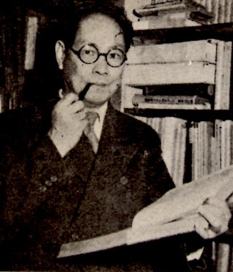 昭和31年刊『読書家の散歩』（現代教養文庫）に掲載。